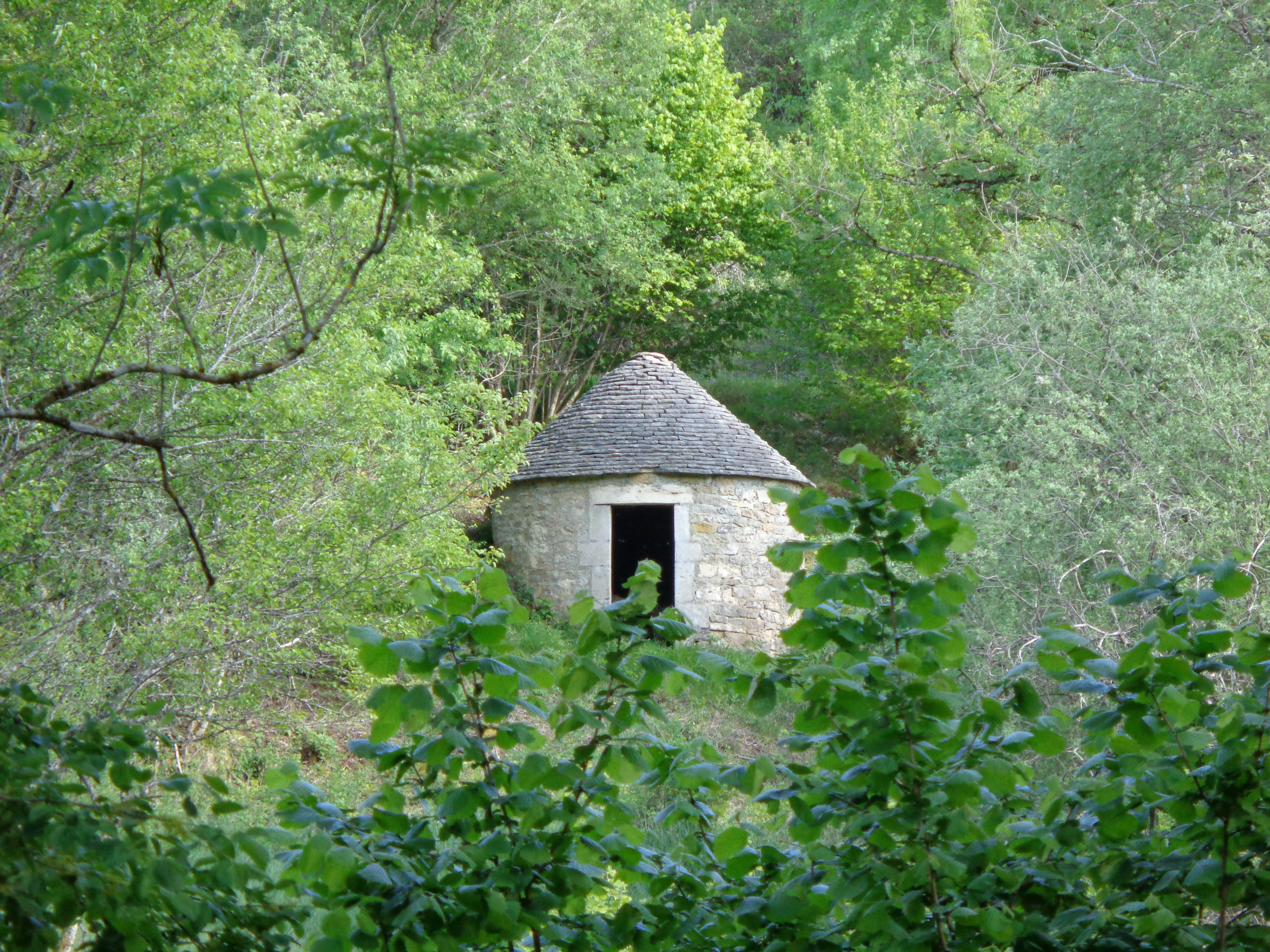 Bélier Hydraulique de St Germain le Rocheux situé dans la vallée du Brevon